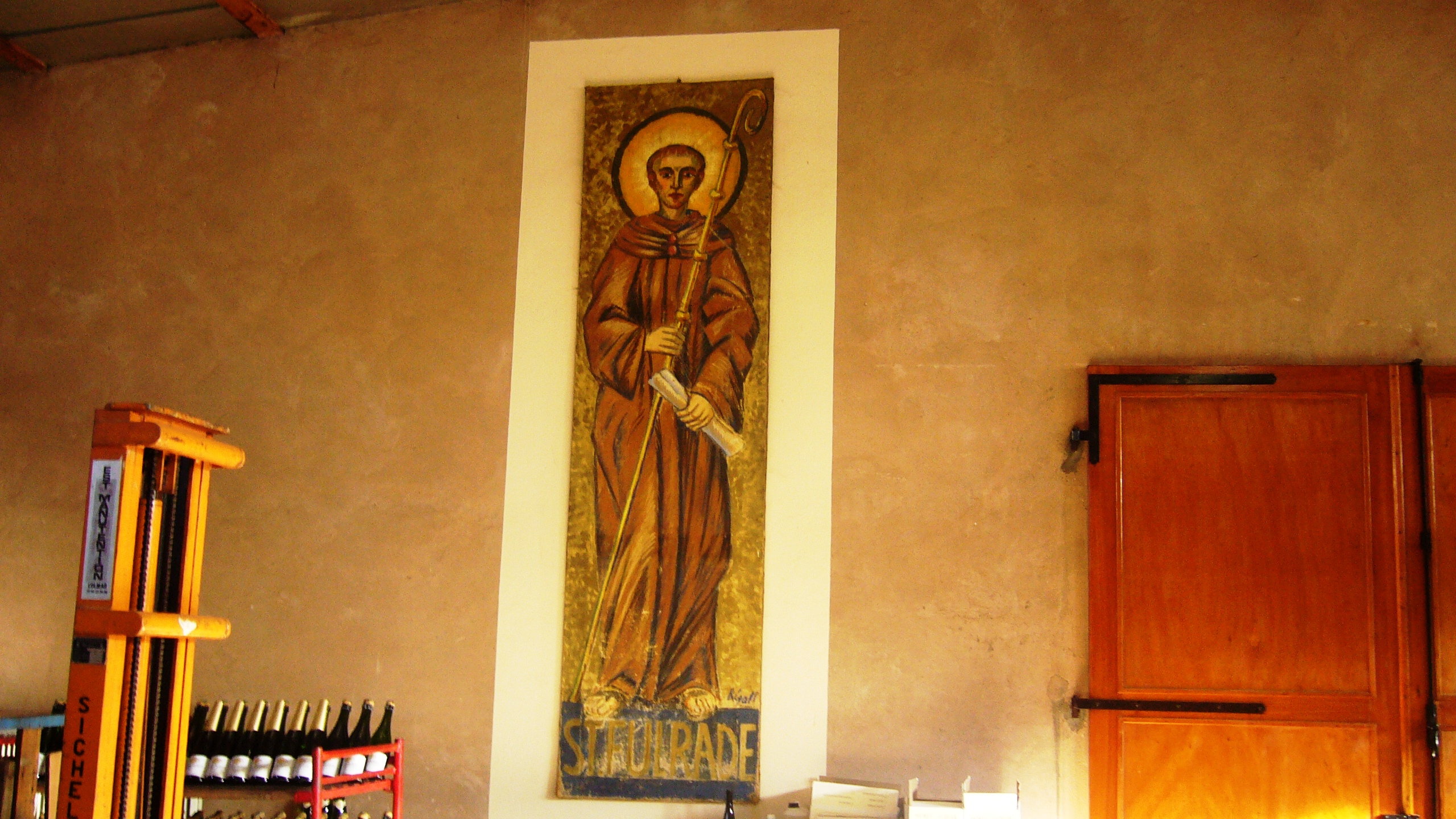 Portrait de l'abbé Fulrad peint par Robert Gall au début du XXe siècle se trouvant dans la cave viticole de Huber & Bleger à Saint-Hippolyte